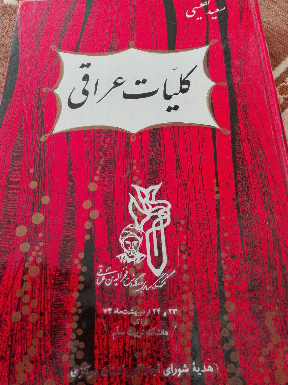 دیوان شعر عراقی